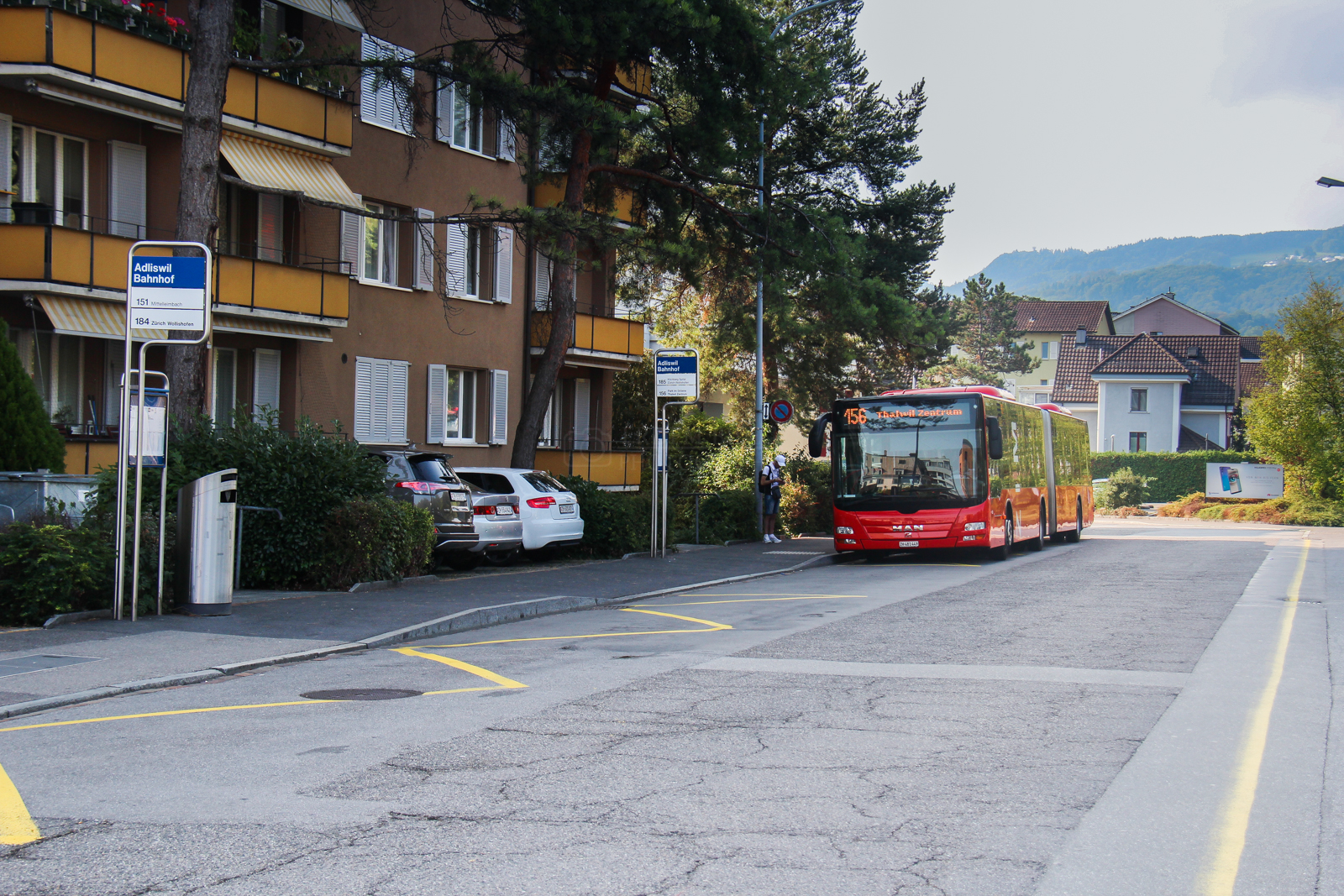 Die Busse 151, 152, 156 und 185 Haltestellen am Bahnhof Adliswil, aufgenommen am 19.08.2018